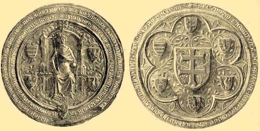 Pečeť Zimnuda Lucemburského